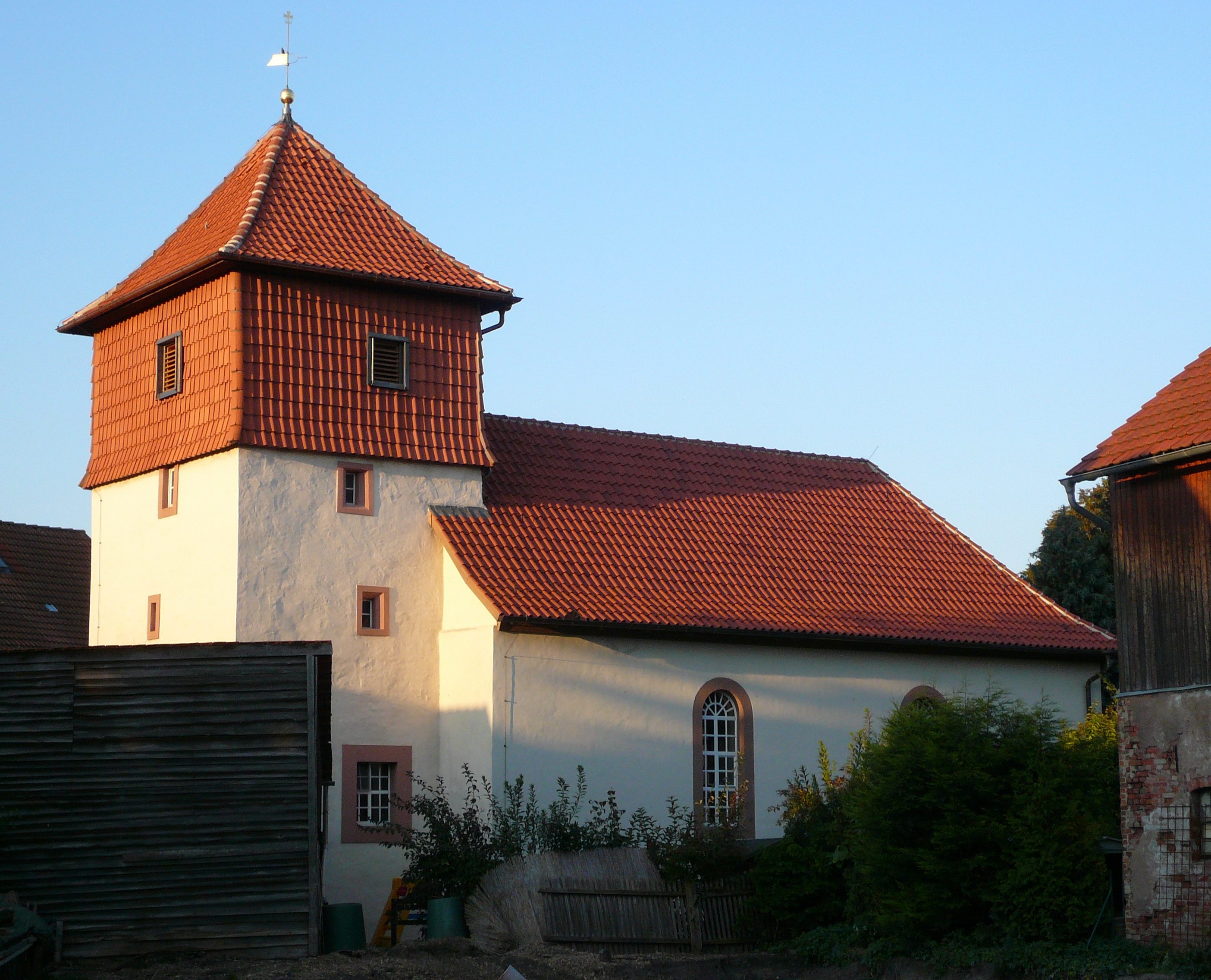 Ev.-luth. Kirche St. Margarethen in Göttingen-Holtensen, Südniedersachsen. Turm mittelalterlich, Kirchenschiff 1749 unter Einbeziehung von Resten des Vorgängerbaus erneuert. Blick von Südwesten (nach Abriss eines Gebäudes)